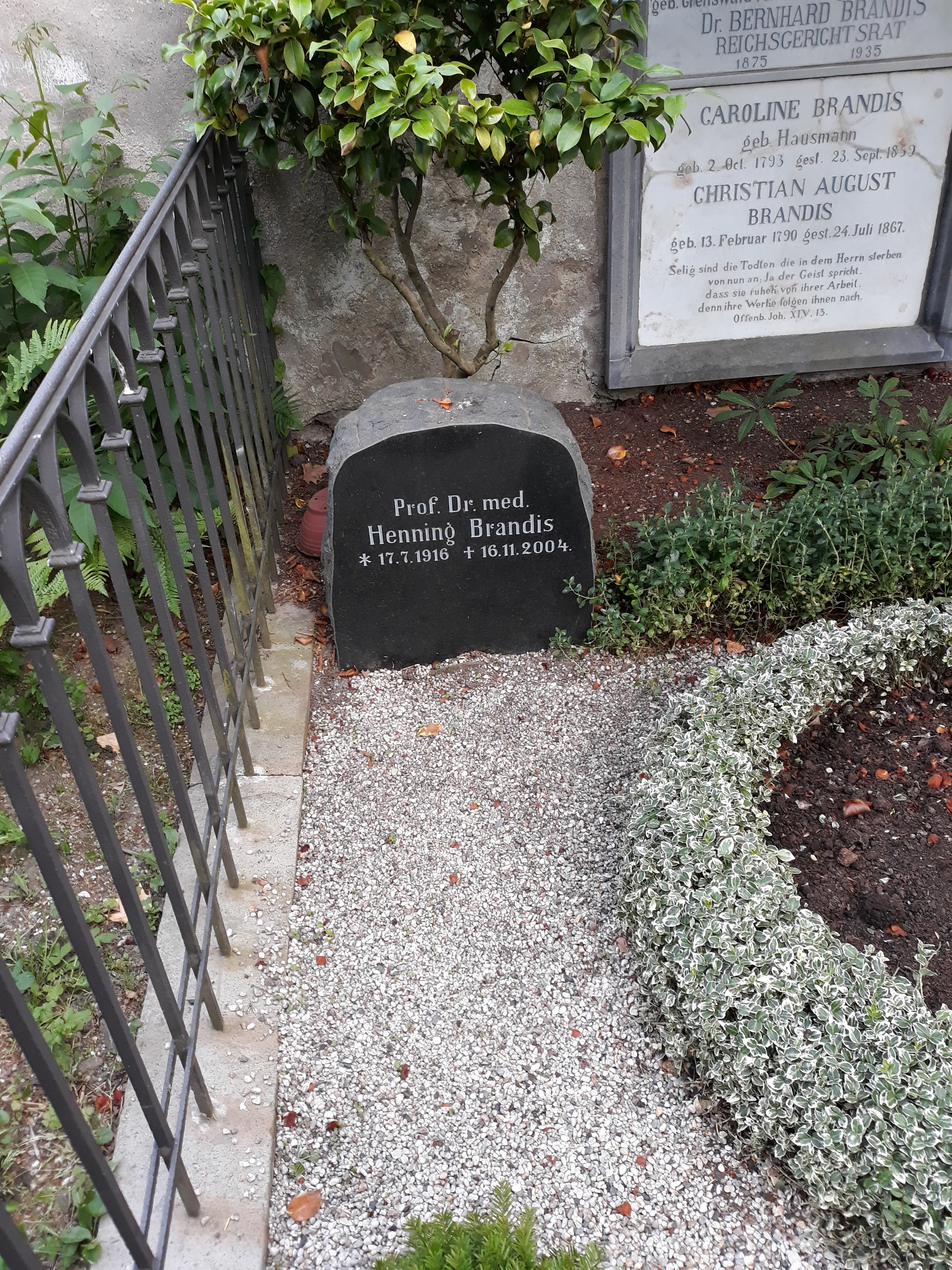 Das Grab des deutschen Mikrobiologen Henning Brandis im Familiengrab Brandis auf dem Alten Friedhof Bonn.